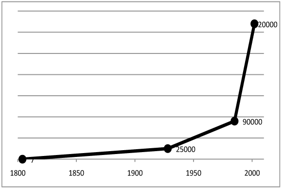 Mitgliederentwicklung der RHS, 1804-2010